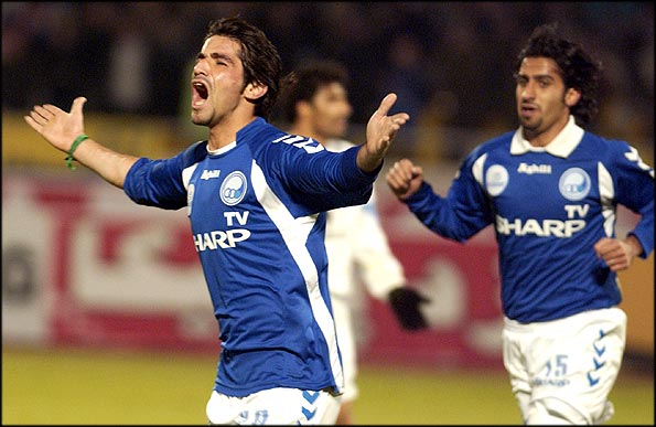 گزارش نیمه اول - گزارش نیمه دوم